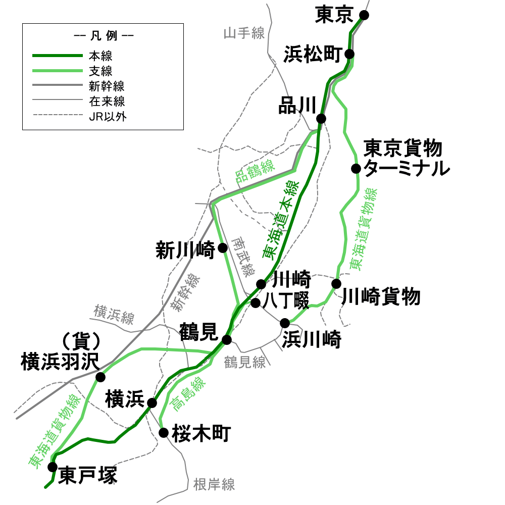 東海道本線東京地区の支線図